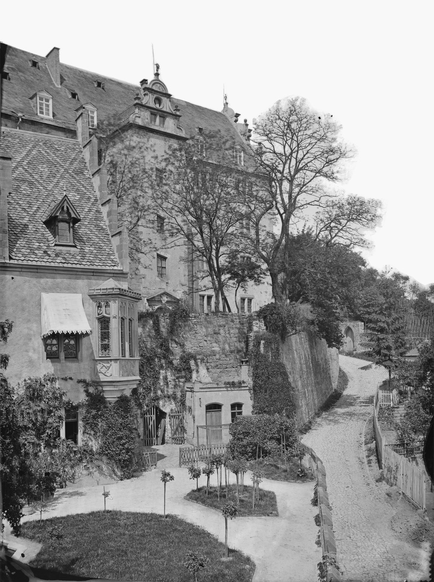 Wolfsburg (Teilansicht im linken Vordergrund) in der Landgraf-Philipp-Straße 2 und ehemalige landgräfliche Kanzlei ("Neue Kanzlei") in Marburg. Ansicht von Südosten.